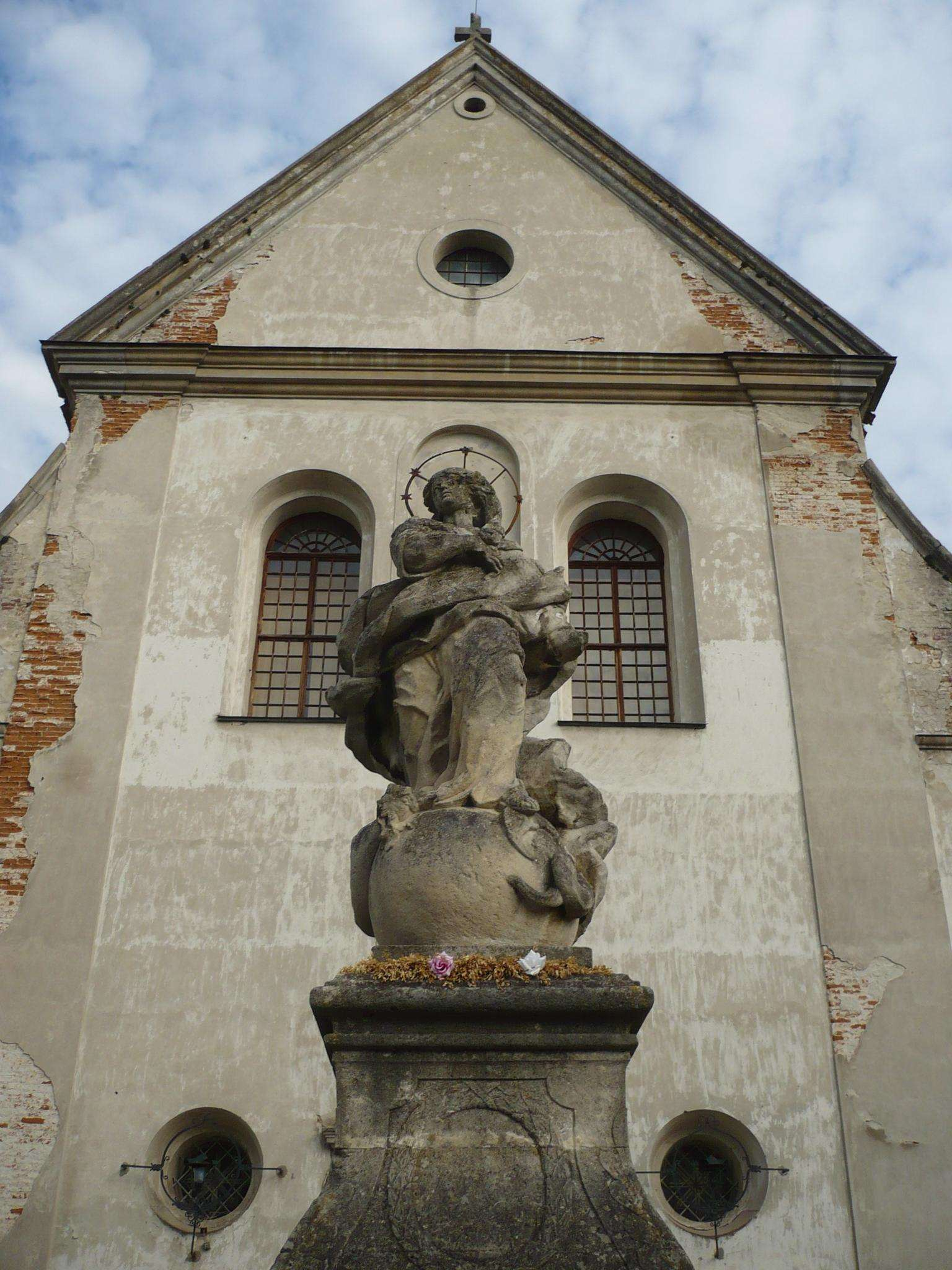 Rzeźba przy klasztorze oo. kapucynów w Olesku